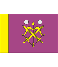 Проект прапора села Бишів, що не був затверджений сільською радою